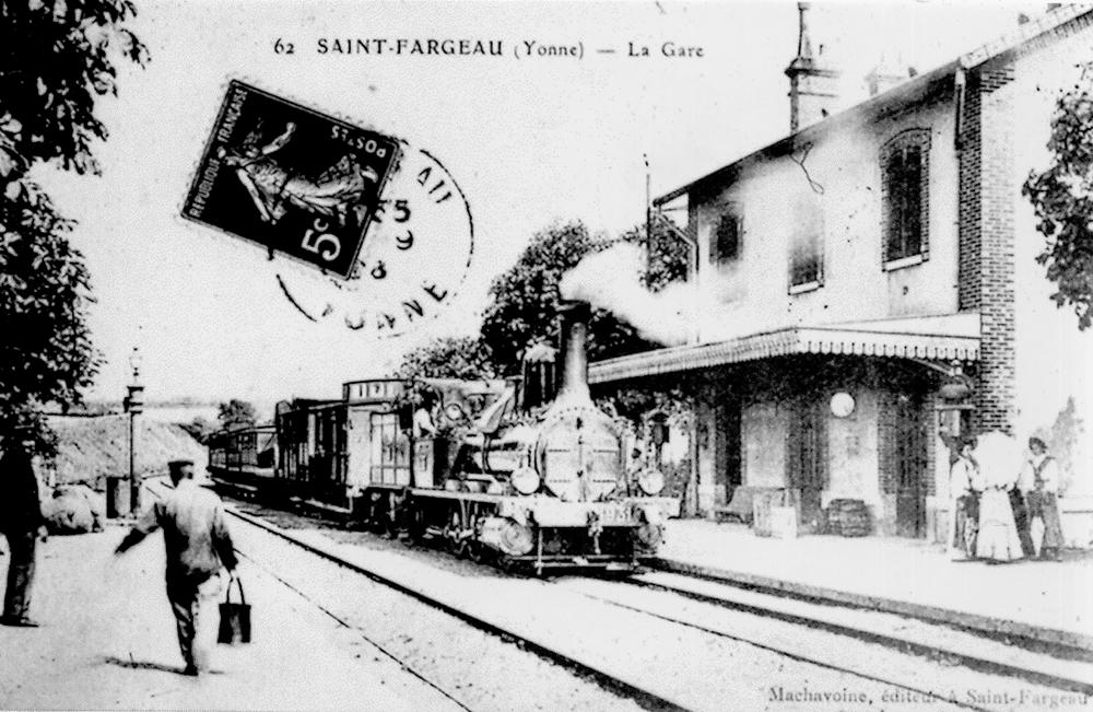 Carte postale ancienne de la gare de Saint-Fargeau, Yonne, France